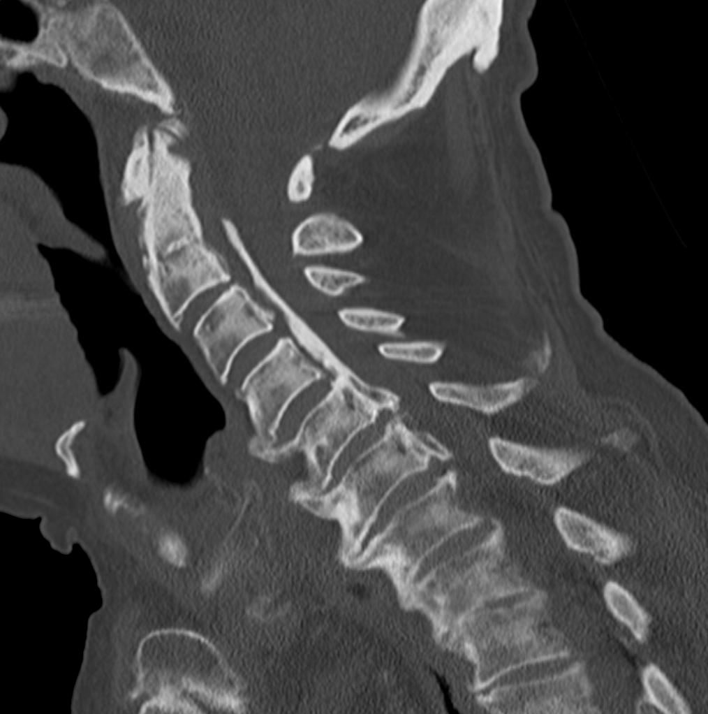 Ossifikation Ligamentum longitudinale posterius HWS CT sagittal